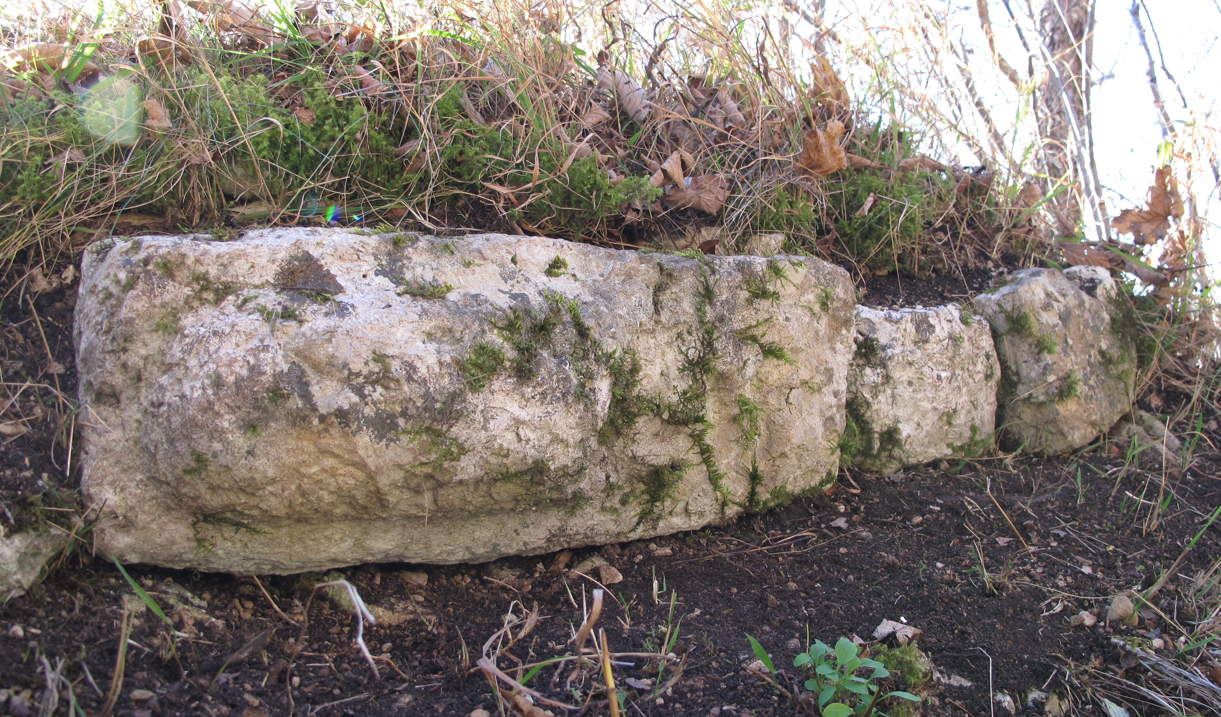 Buckelquader am östlichen Rand der Burgfläche.